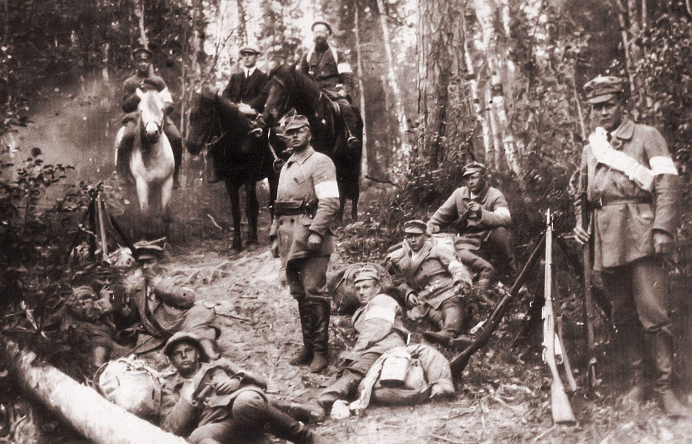 Heimosotureita Vienan-Karjalan sotaretkeltä, kuvassa mukana kirjailia Ilmari Kianto takana ratsailla keskellä.